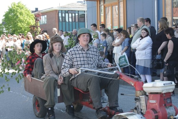 Oppstart i vømmøltoget. 1 Juni 2009